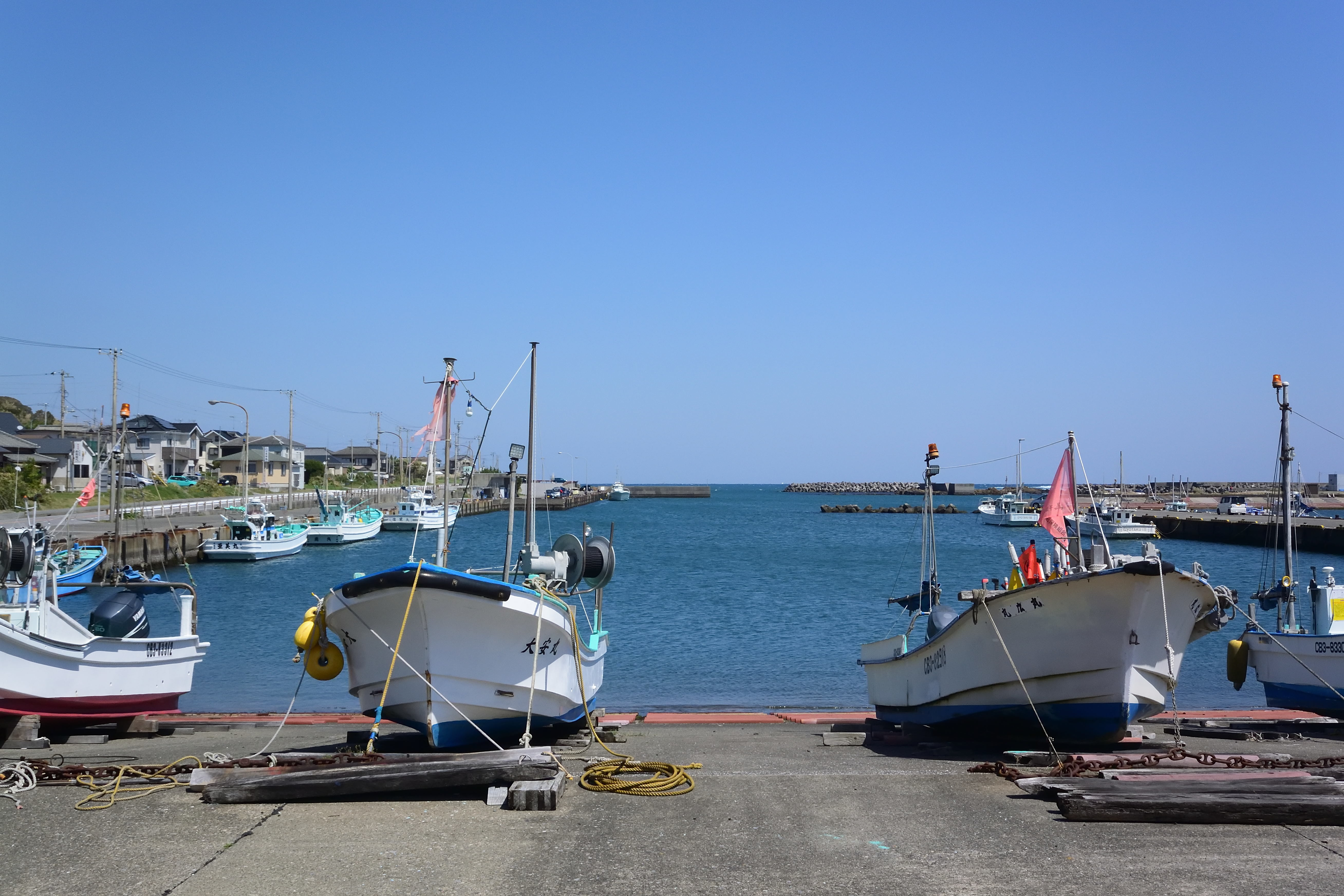 乙浜漁港全景